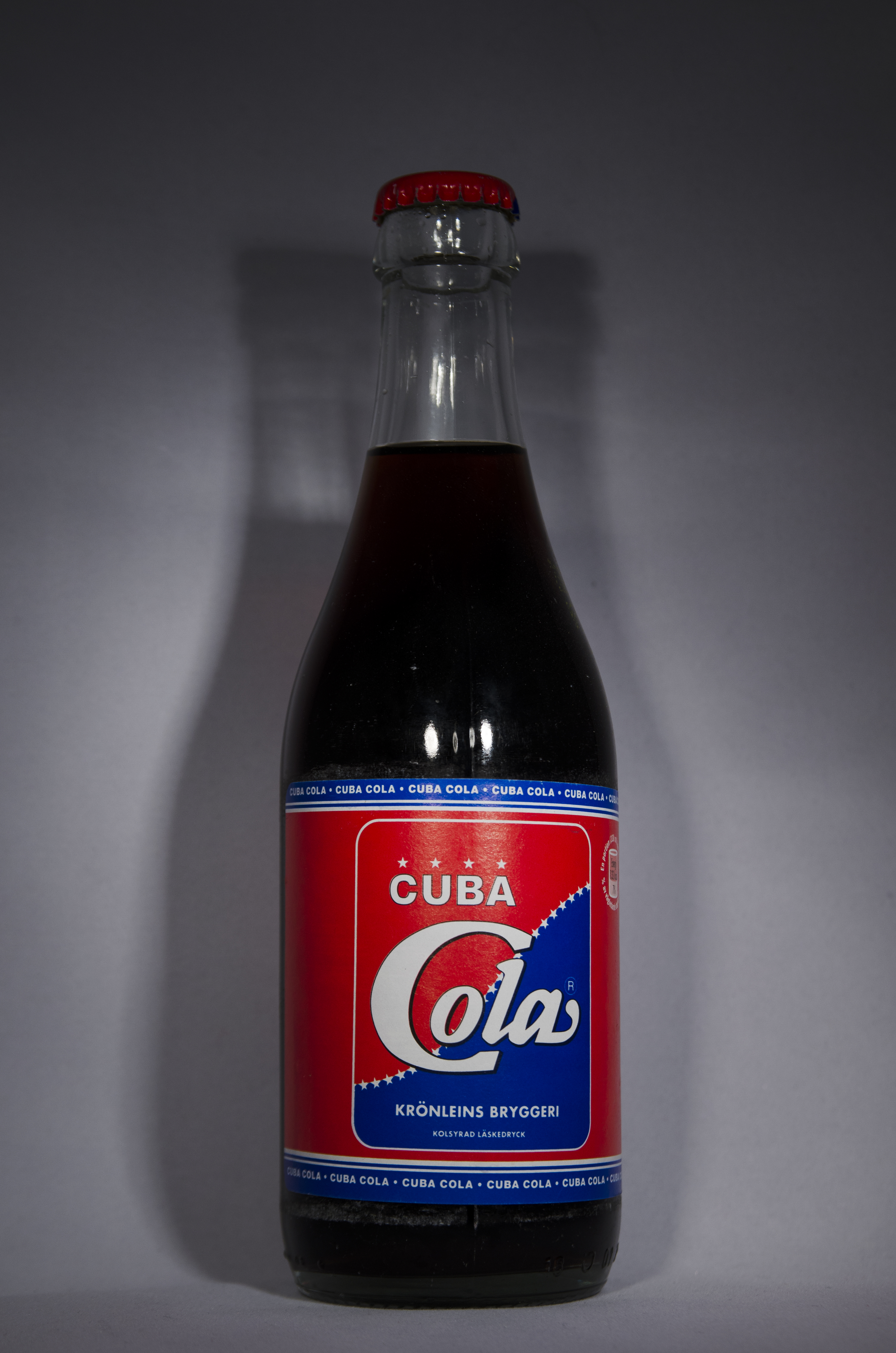 En klassisk Cuba Cola flaska.